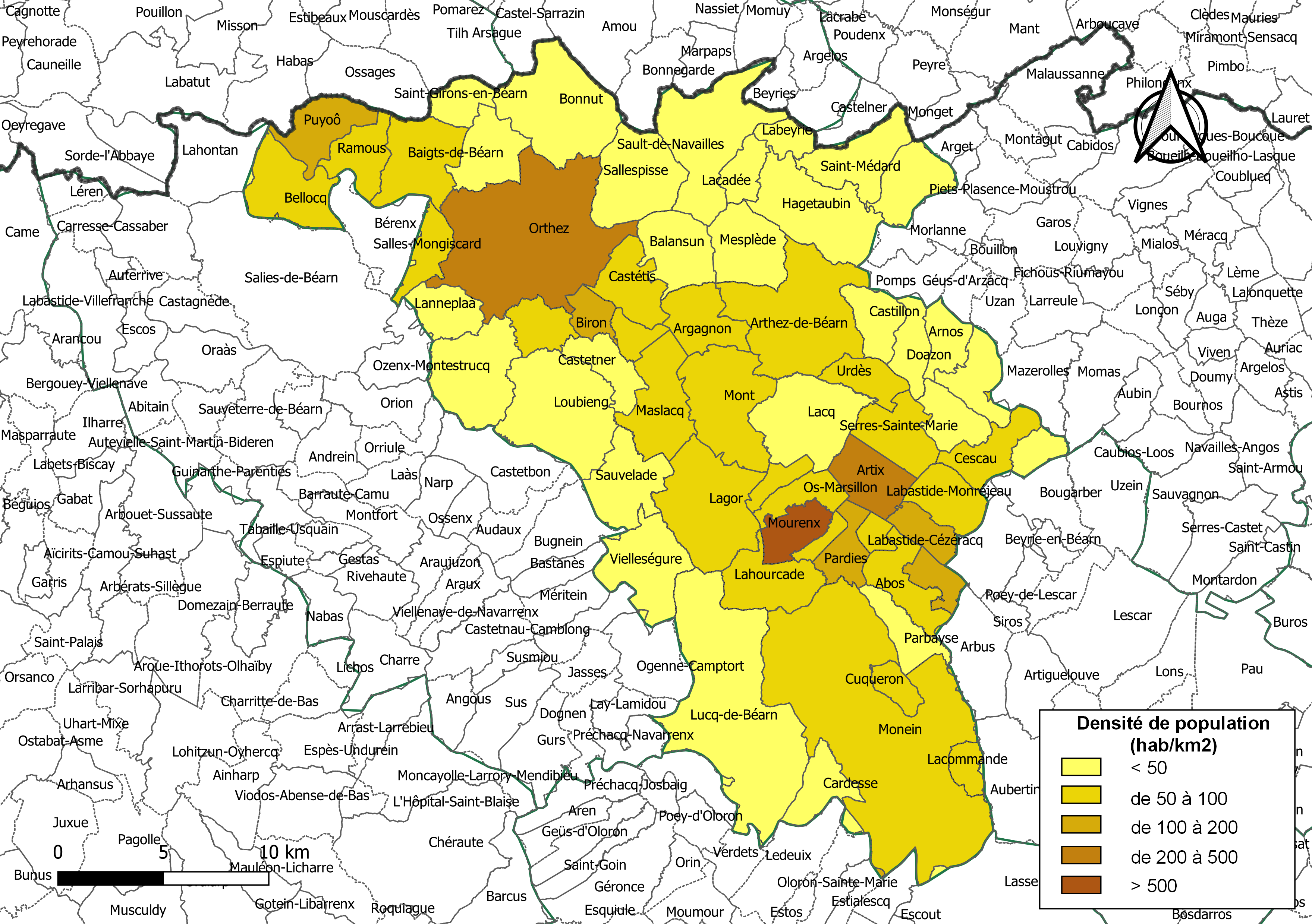 Carte des densités de population (millésimée 2016) des communes de la Communauté de communes de Lacq-Orthez, département des Pyrénées-Atlantiques, France. Composition au 1er janvier 2019.